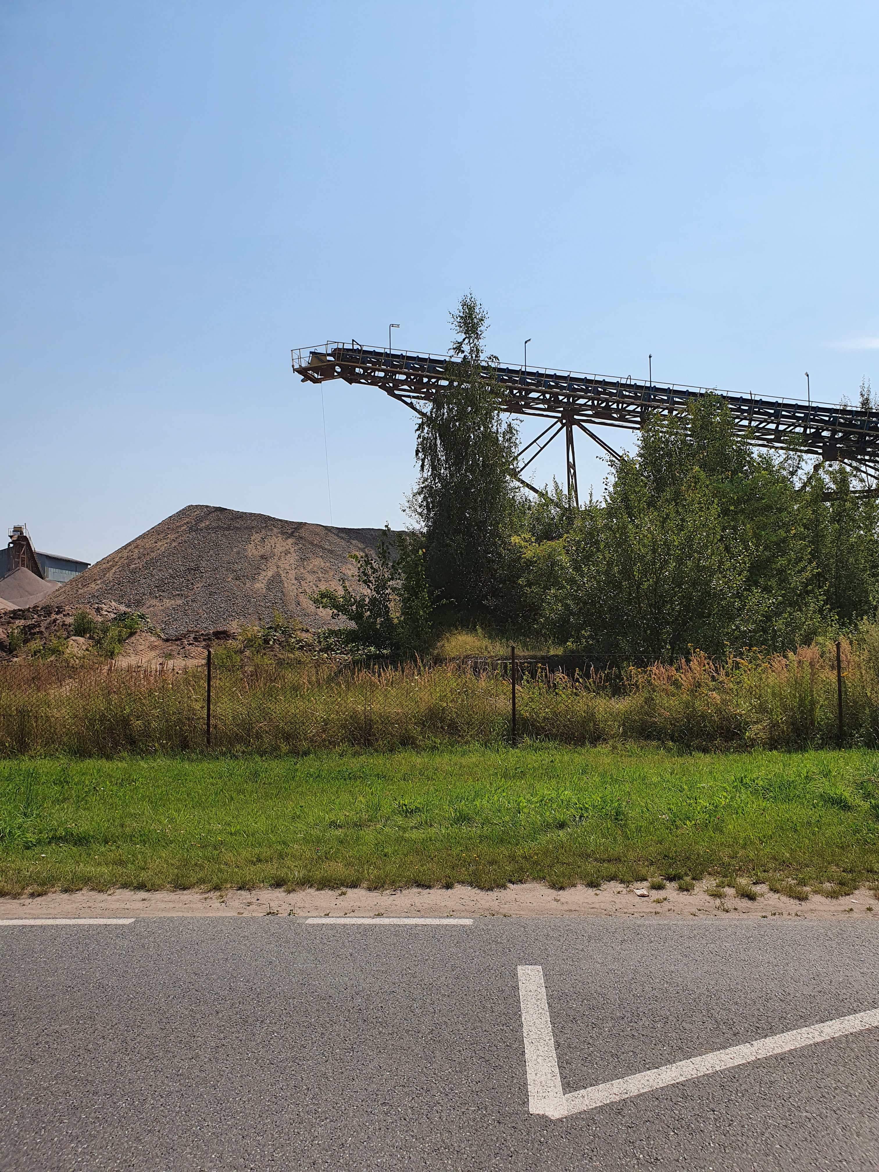 Hałda żwiru w Mietkowie